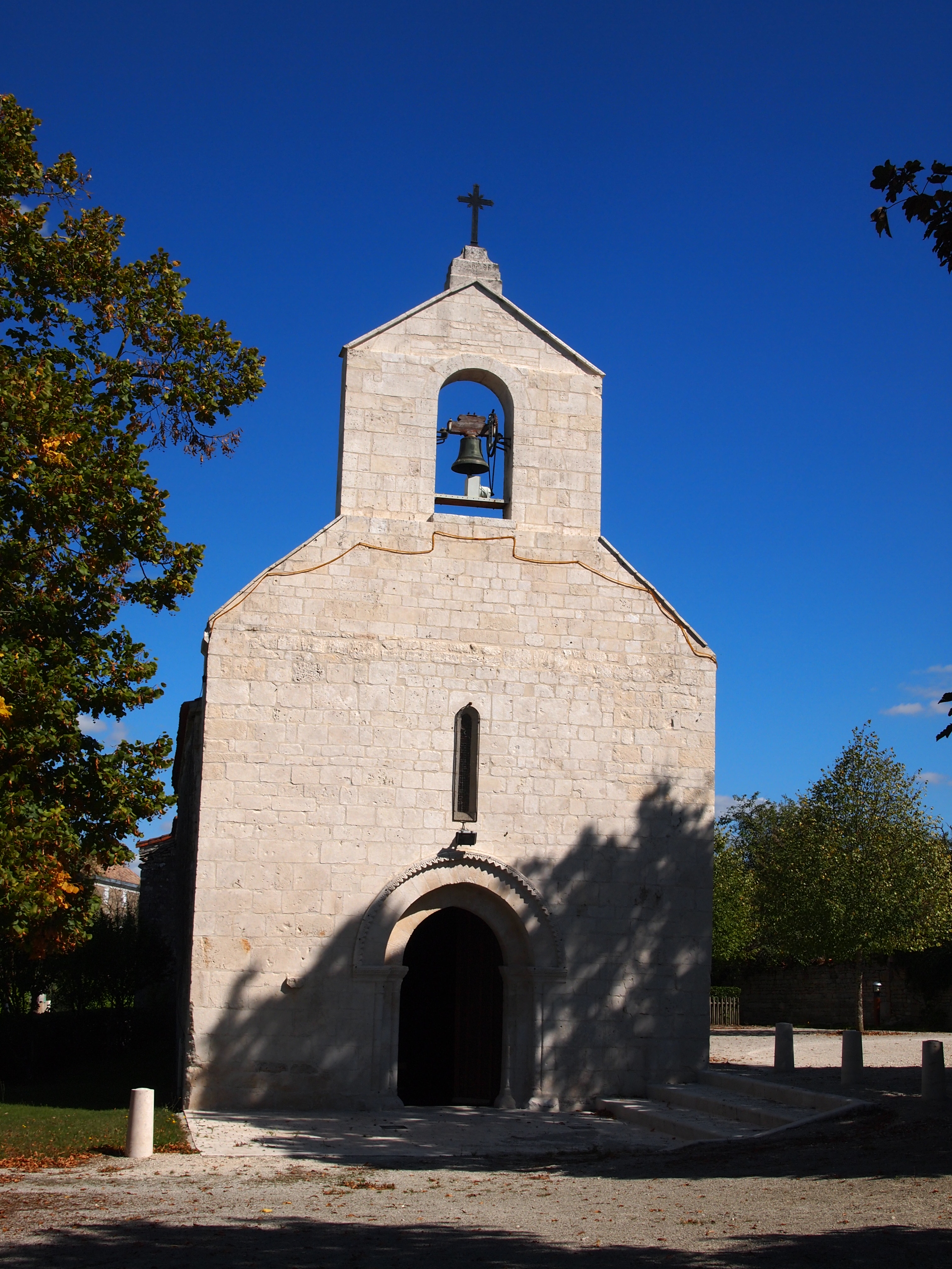 église de Fontclaireau en Charente (France)